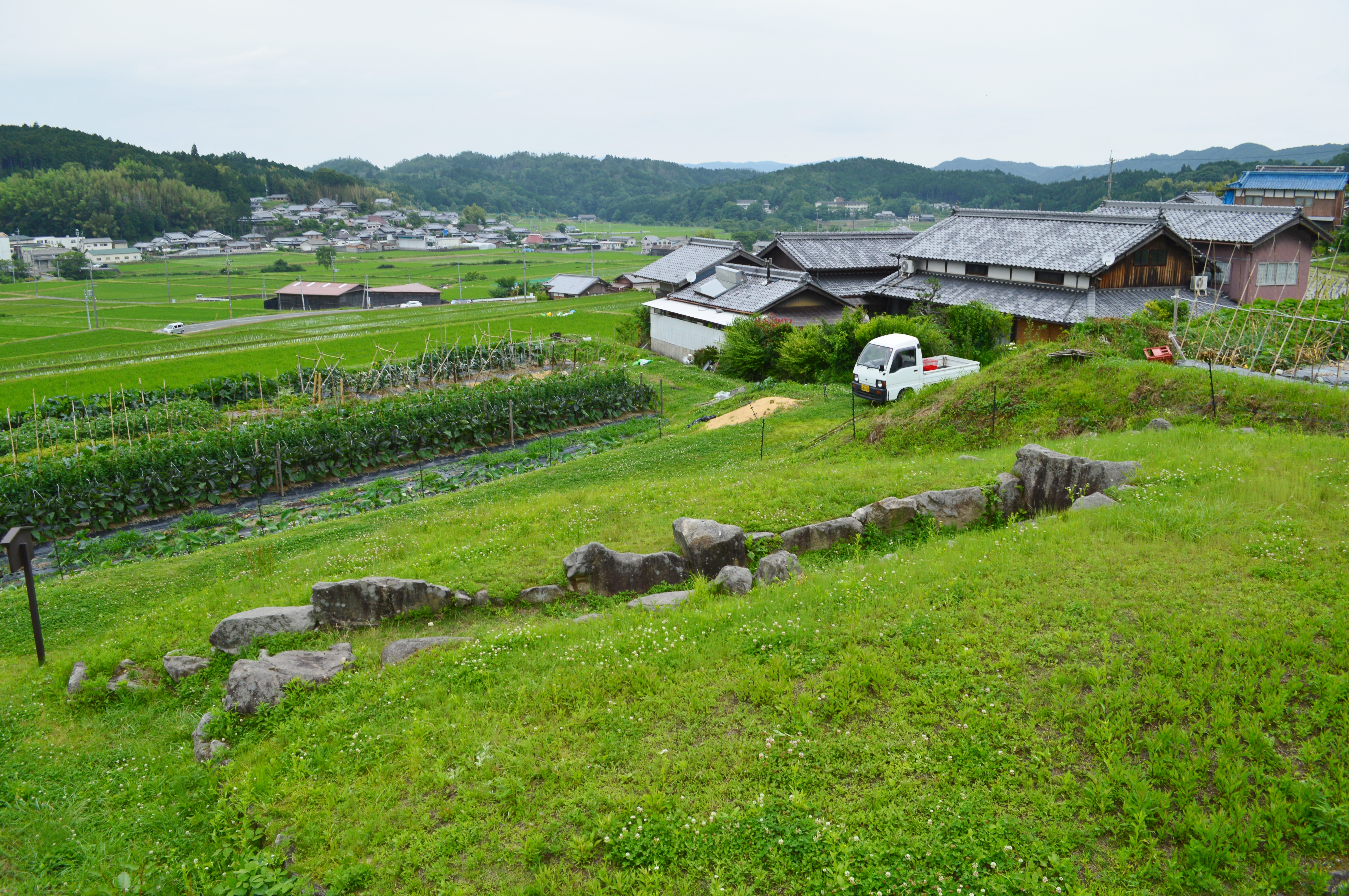 水木古墳から大柳生盆地を望む